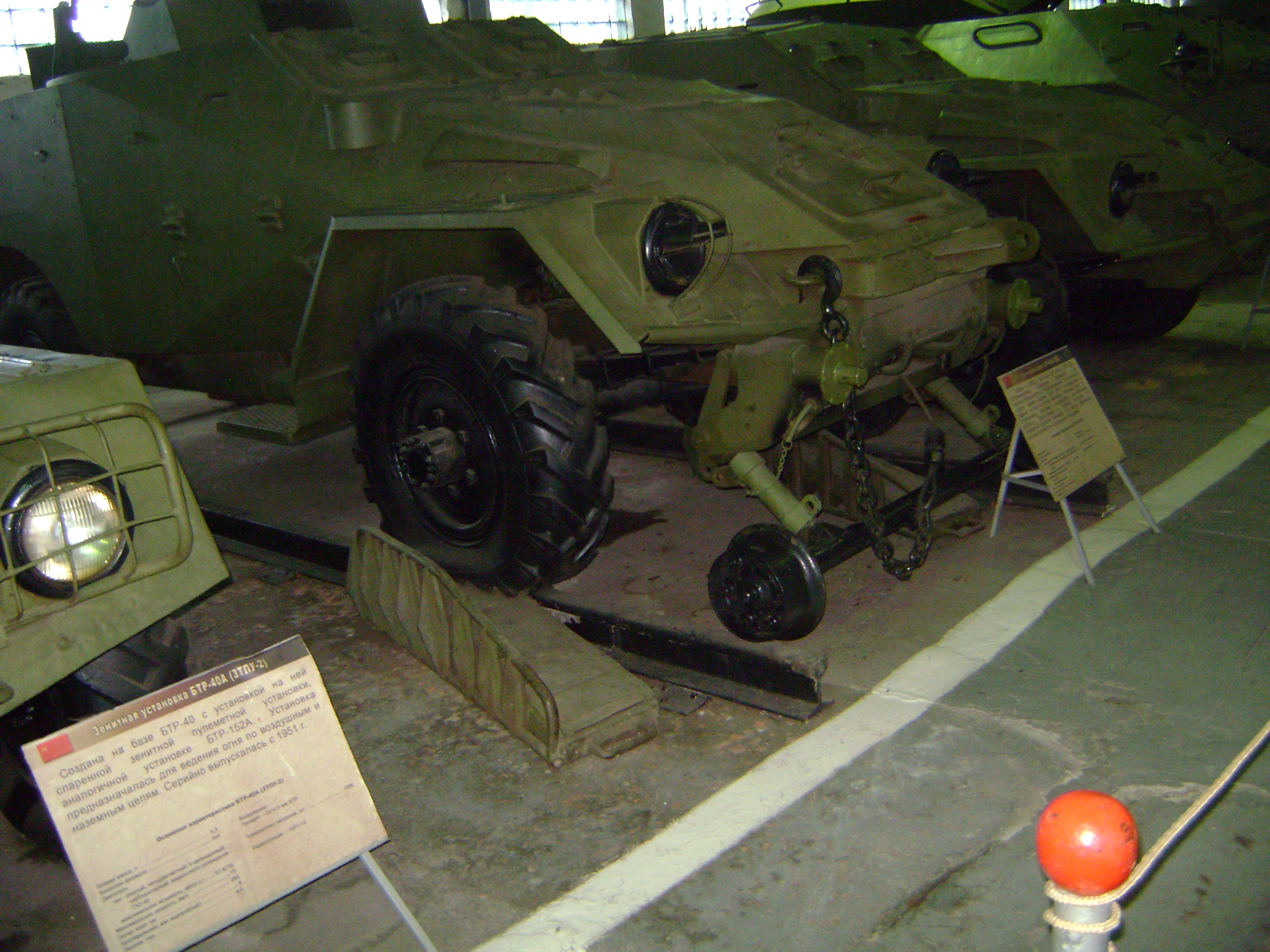 Tank Museum, Kubinka